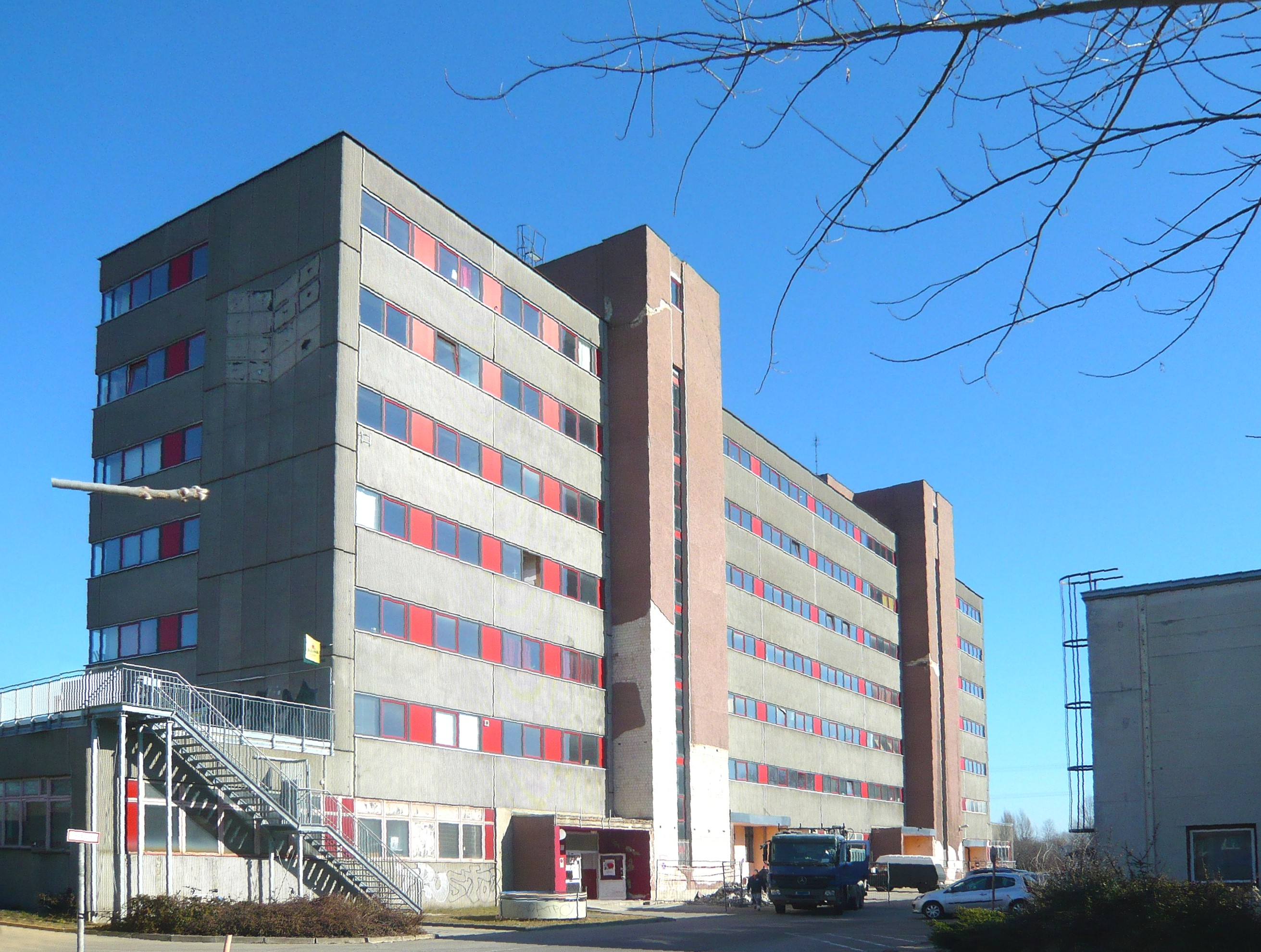 Ortsteil Berlin-Marzahn, Frank-Zappa-Straße, Orwohaus von Süden gesehen